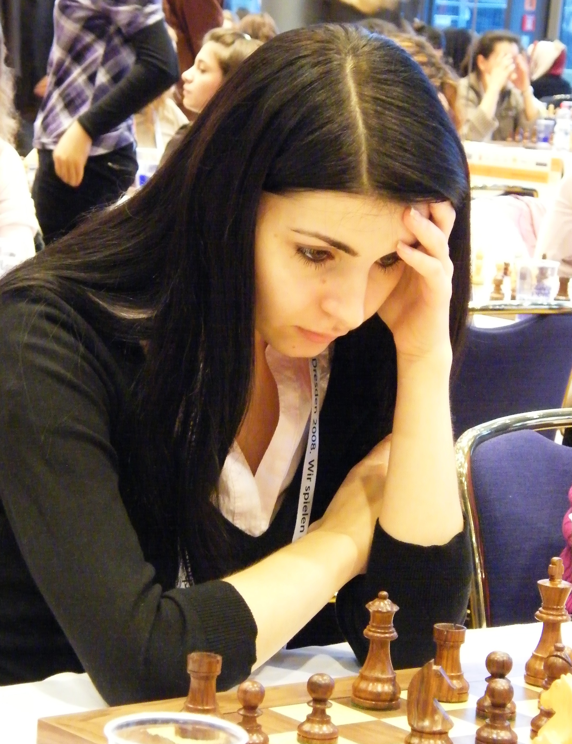 Elena Partac bei der 38. Schacholympiade in Dresden 2008